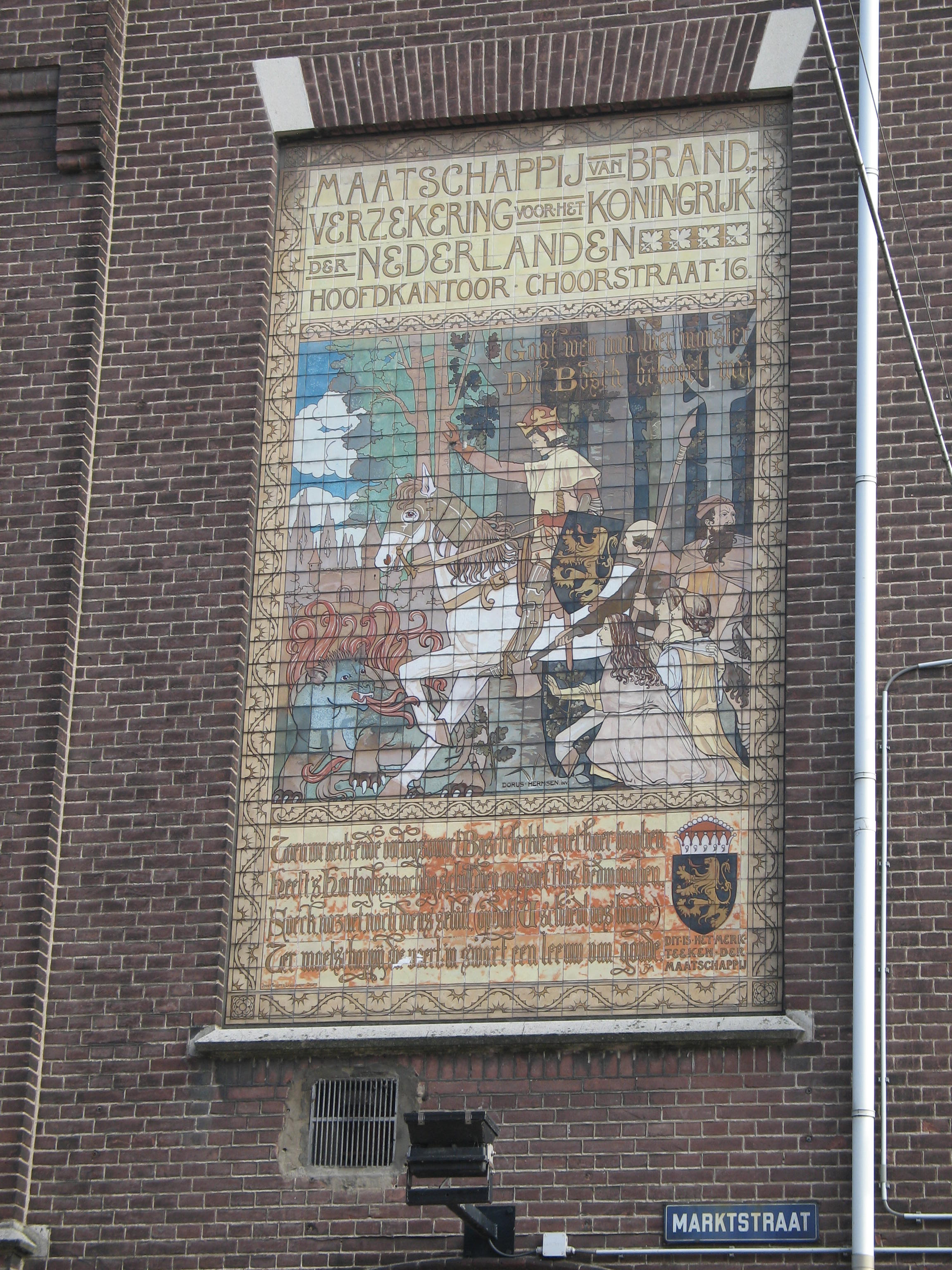 Tegeltableau Hendrik I van Brabant uit 1910 door Dorus Hermsen aan de Marktstraat